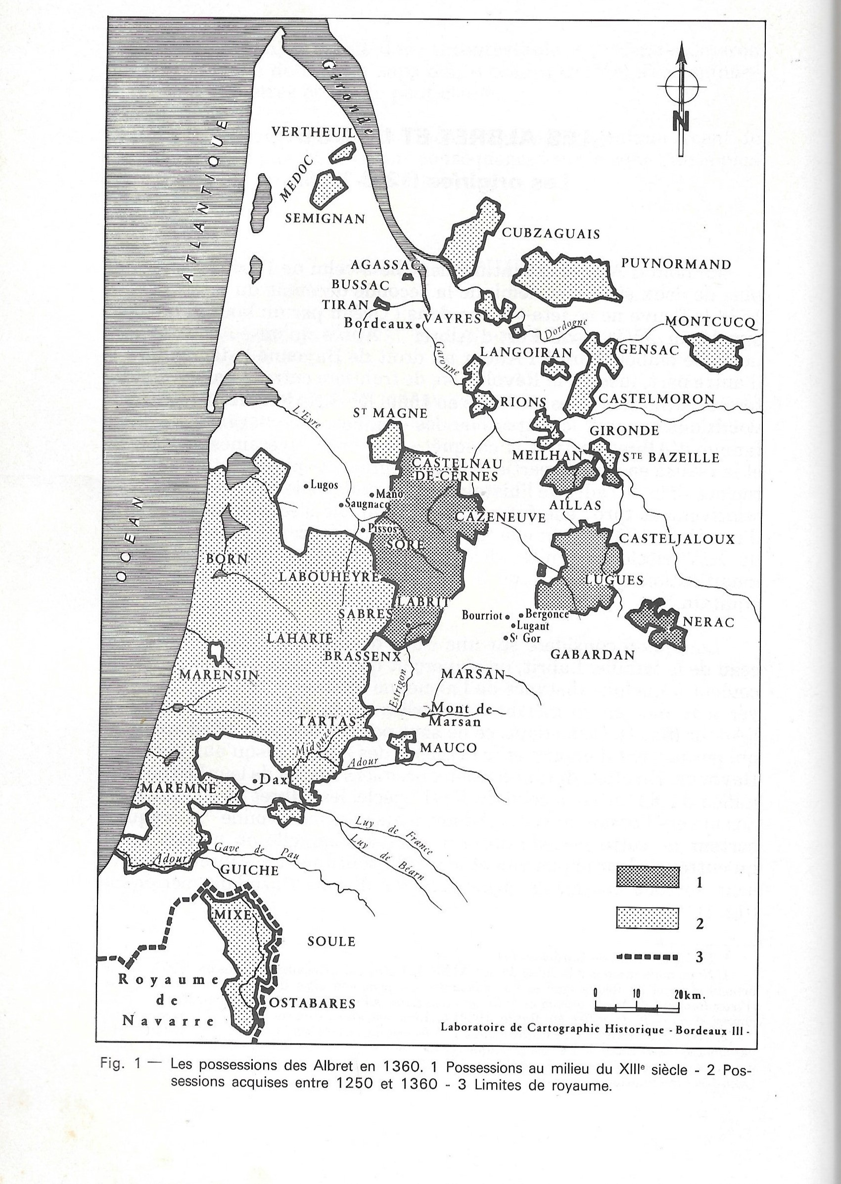 Albret leinuaren erdi aroko jabetzak Gaskoinian